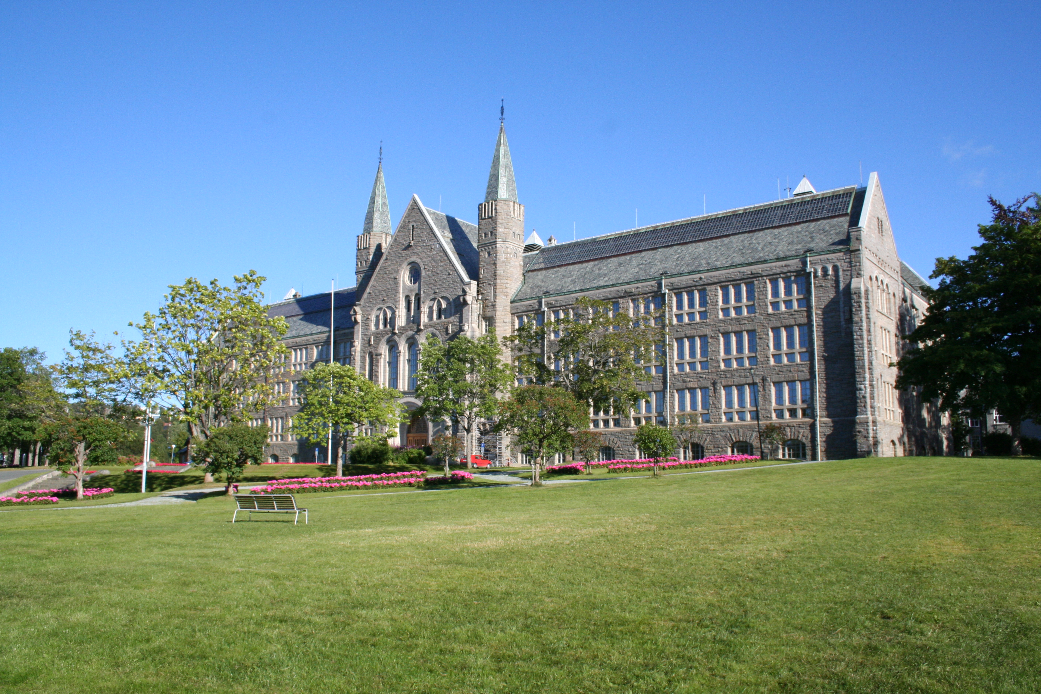 Hovedbygget ved NTNU